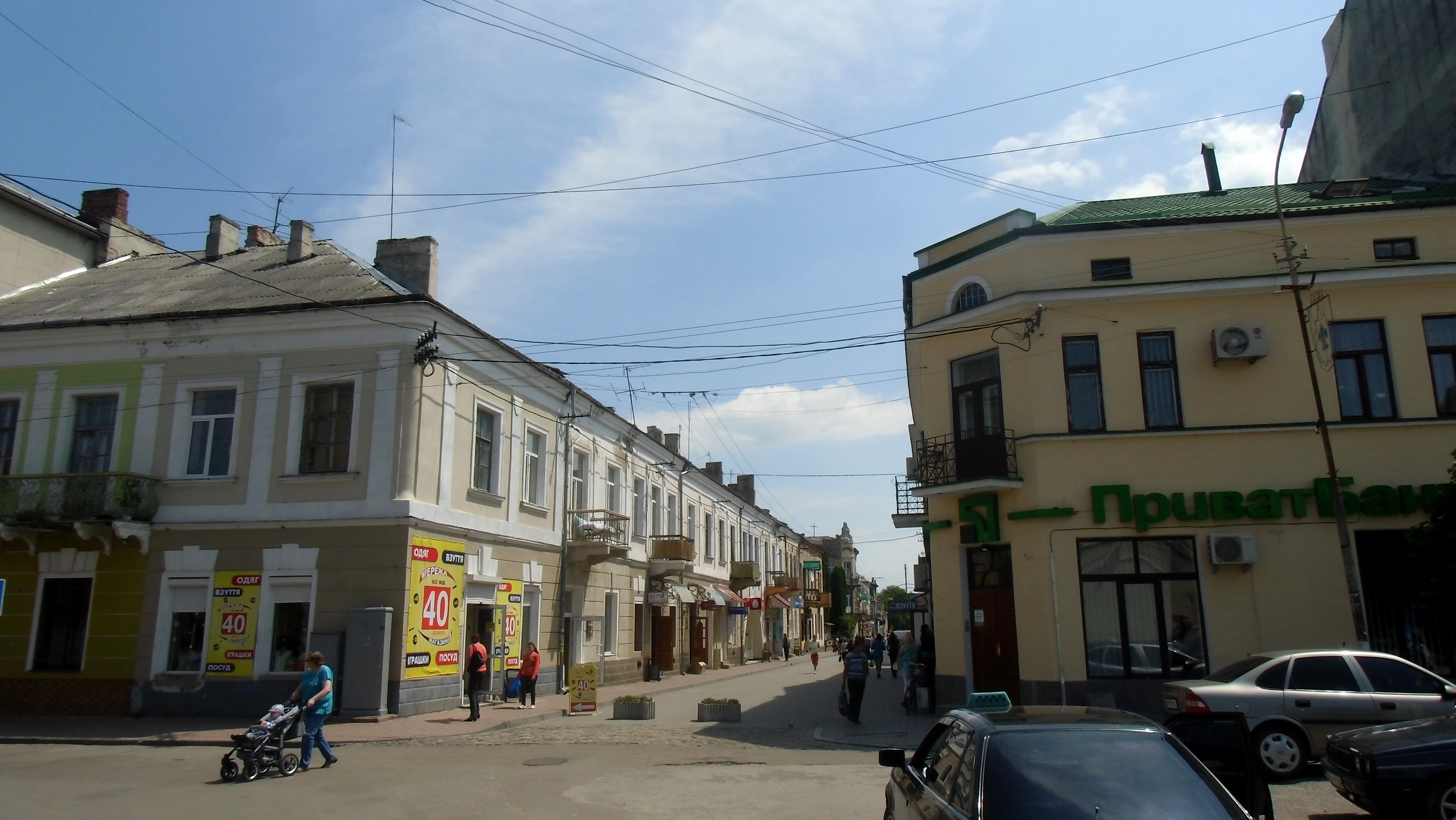 Brody, Lviv Oblast, Ukraine